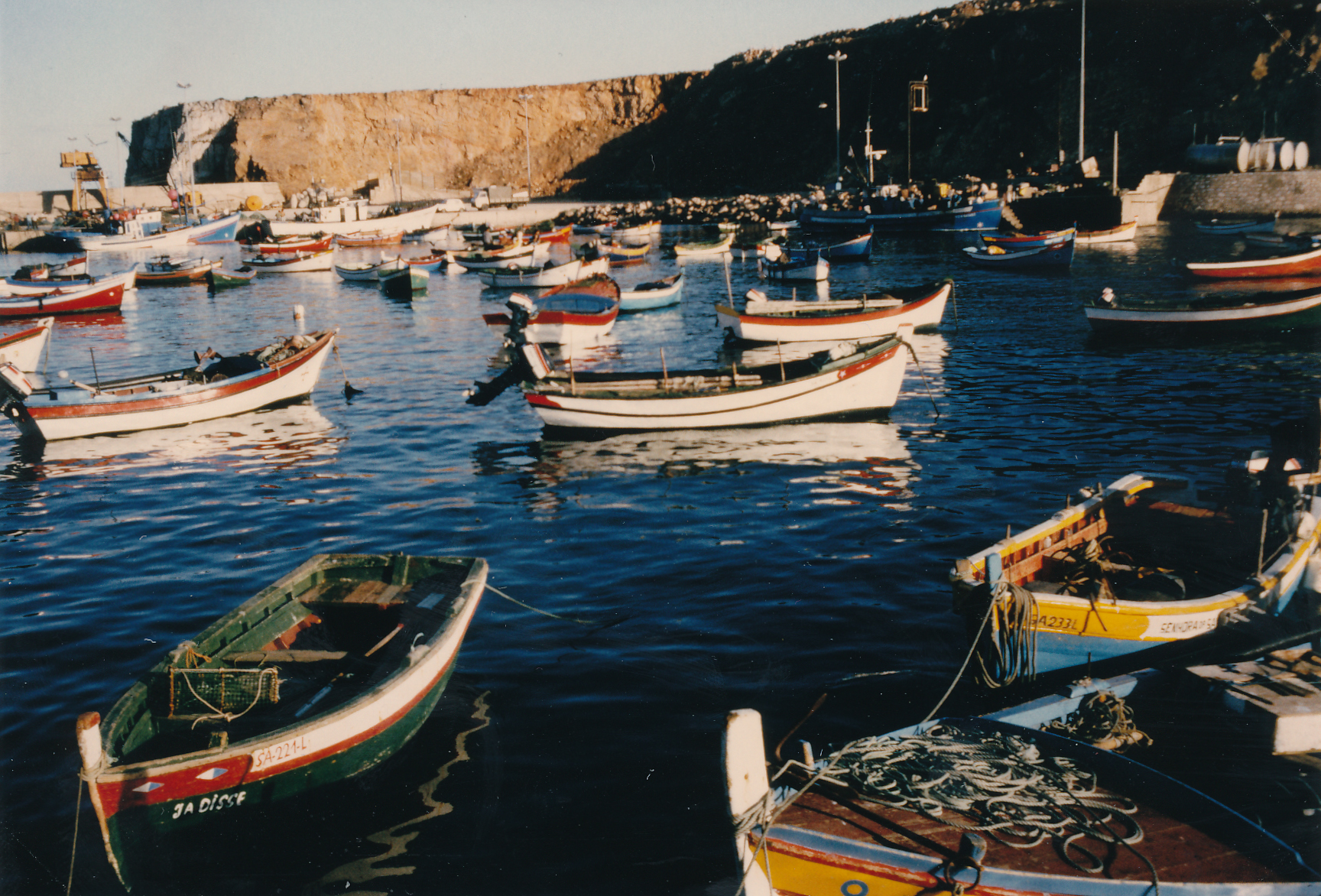 Fischerhafen von Sagres Datum: 09/1985 Urheber: Michael Pfeiffer Quelle: privates Fotoalbum des Urhebers